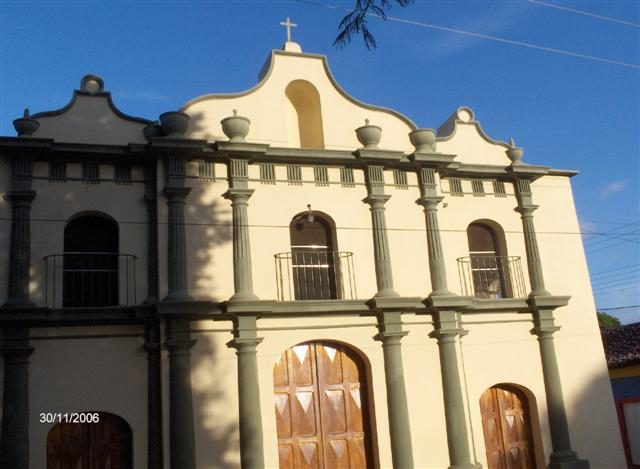 iglesia de chaguaramas edo guarico